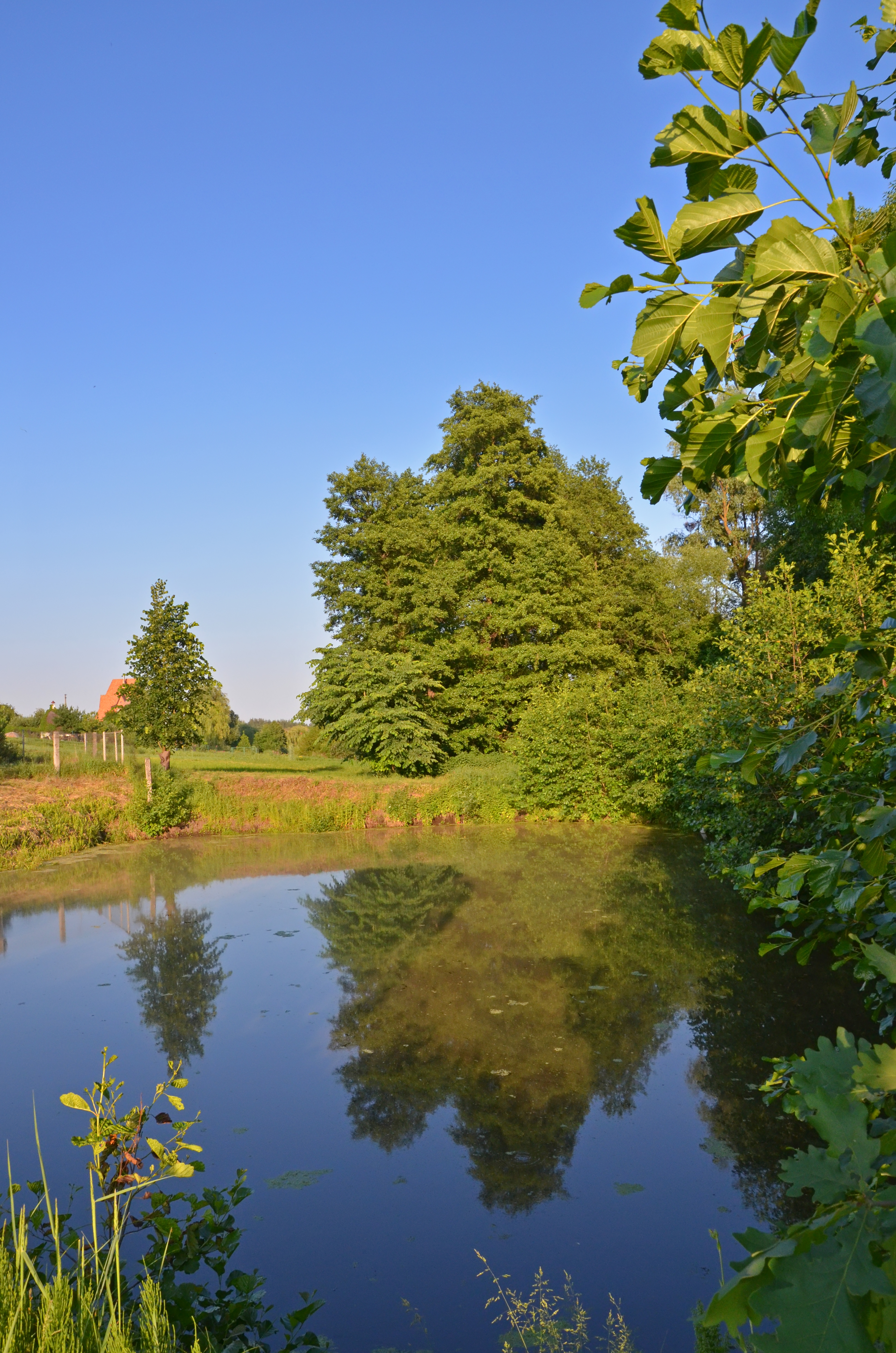 «Корчуватник», Києво-Святошинський район, Шпитьківська сільська рада